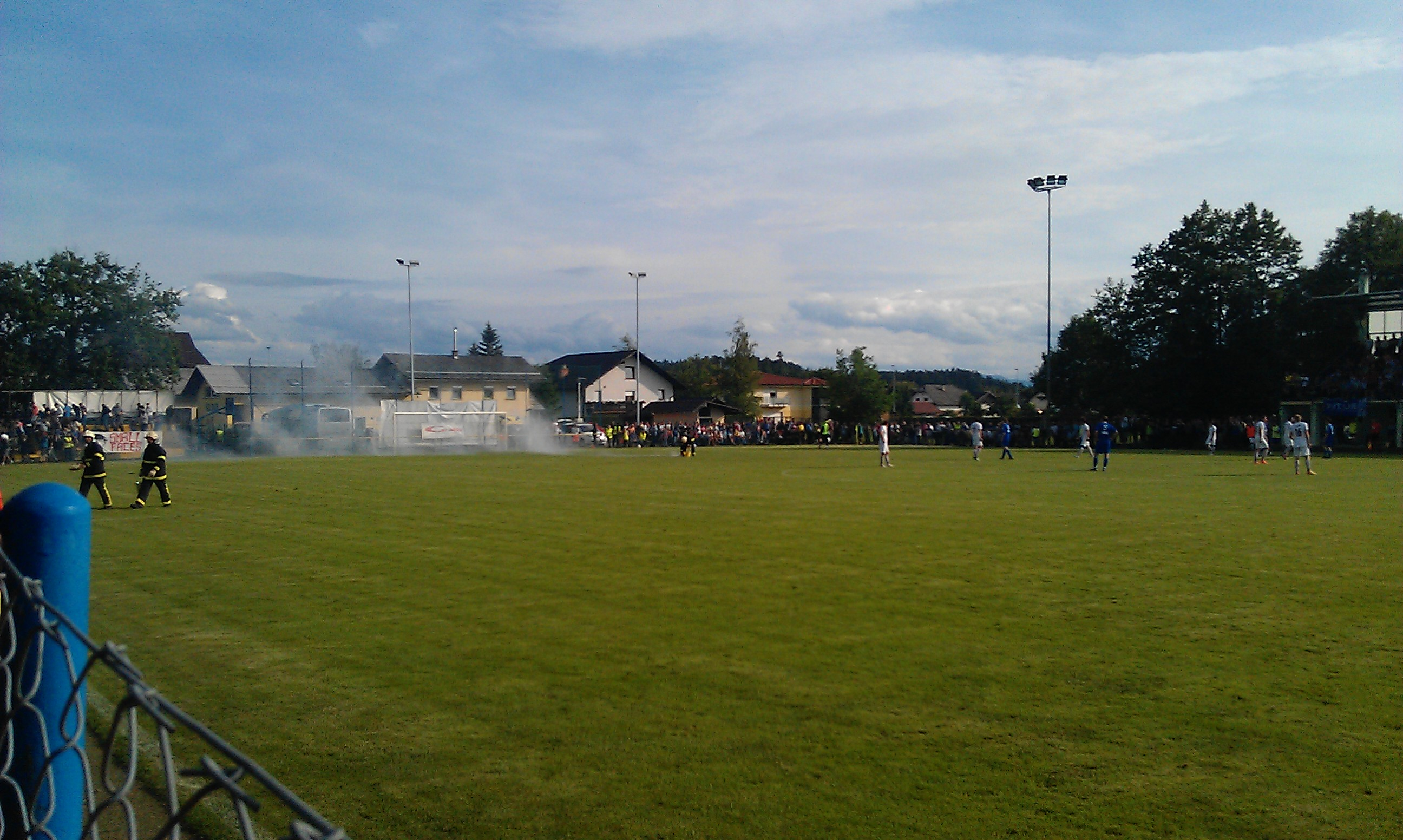 Zgodovinska uvrstitev ekipe NK Dob v prvo slovensko nogometno ligo.